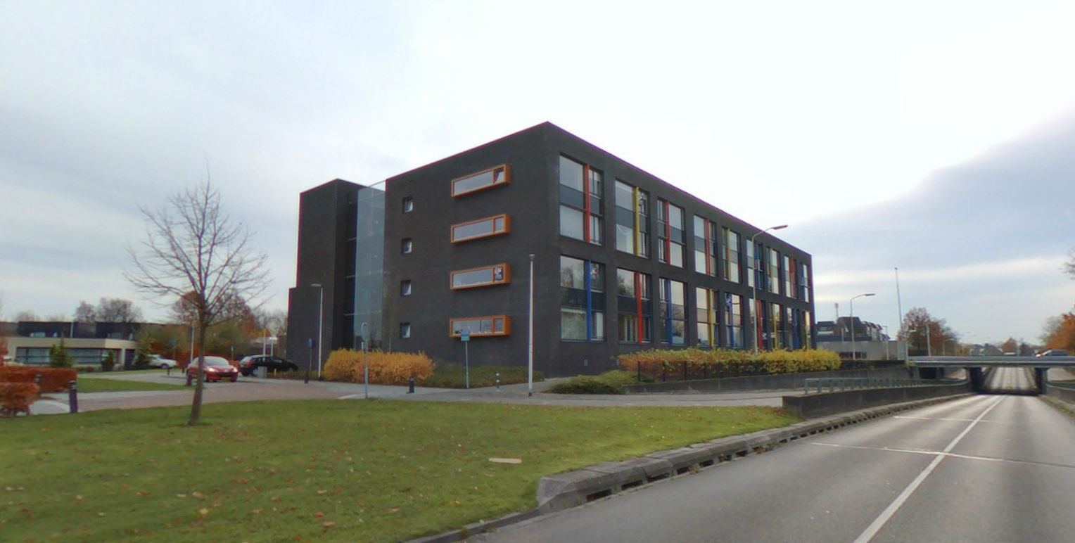 Zicht op woningen in Vlijmen